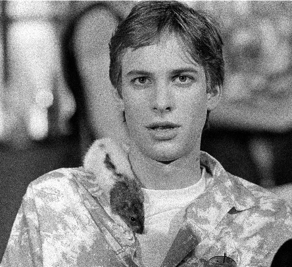 Adam Curry